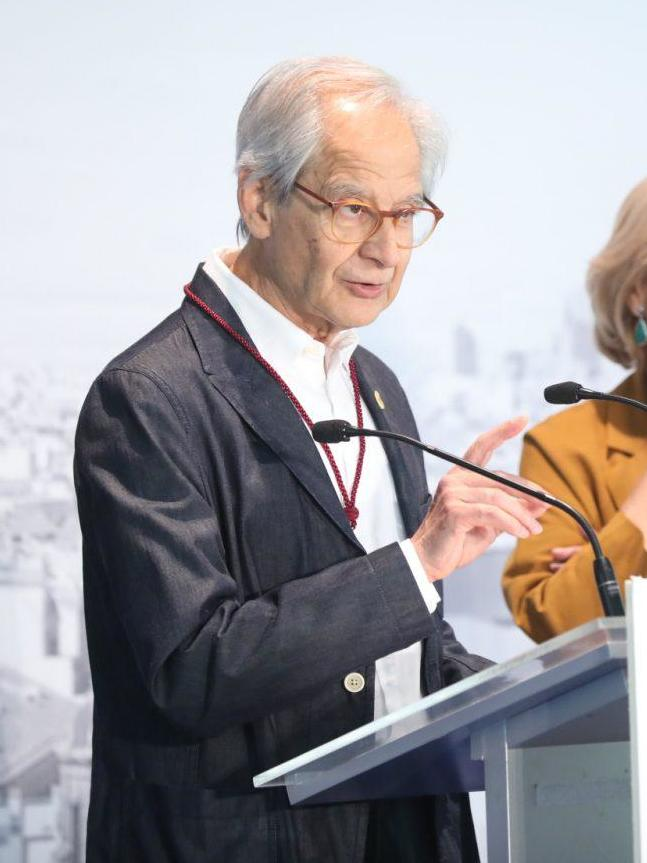 La alcaldesa de Madrid, Manuela Carmena, ha entregado esta mañana, como es tradicional en la festividad de San Isidro, las Medallas de Oro de Madrid, la distinción que otorga el Ayuntamiento de la capital a aquellas personas e instituciones que, además de haber destacado en sus respectivos campos, poseen una vinculación especial con la ciudad. Este año, los galardonados han sido la cantaora Carmen Linares, el cartomago e ilusionista Juan Tamariz, el pintor y dibujante Andrés Rábago ‘El Roto’ y la Mesa Estatal por el Blindaje de las Pensiones.